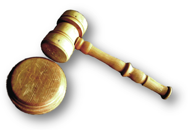 Kohtuniku töövahendid